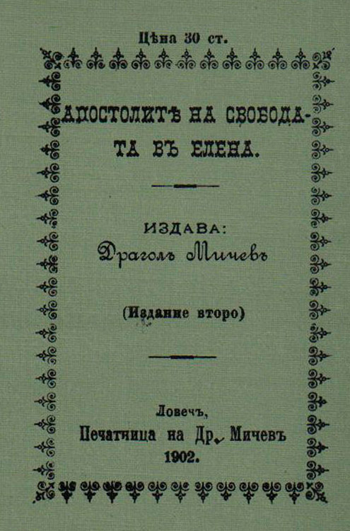 Корица на книгата "Апостолите на свободата в Елена" от Сава Кършовски, 1902